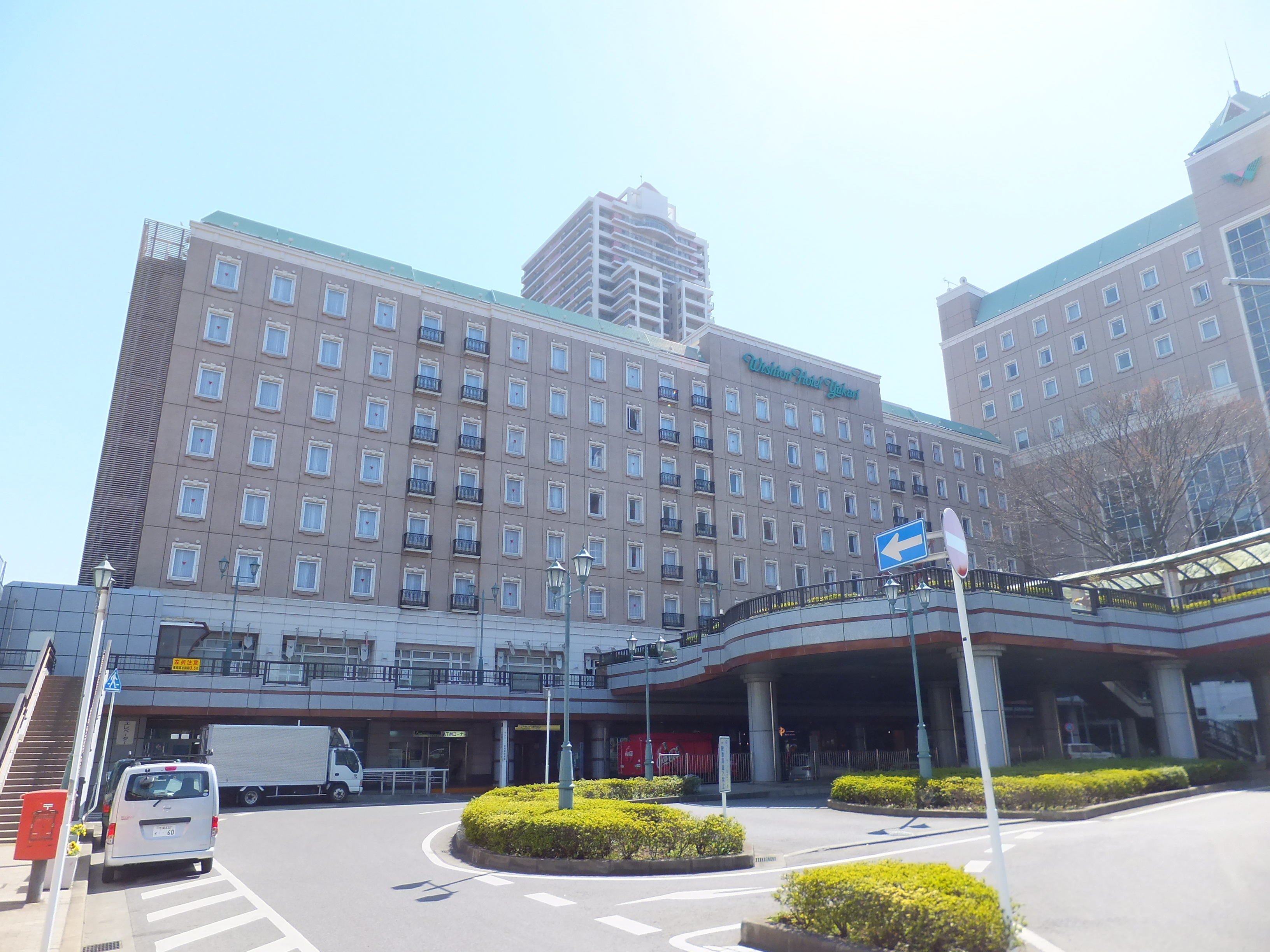 京成電鉄ユーカリが丘駅北口